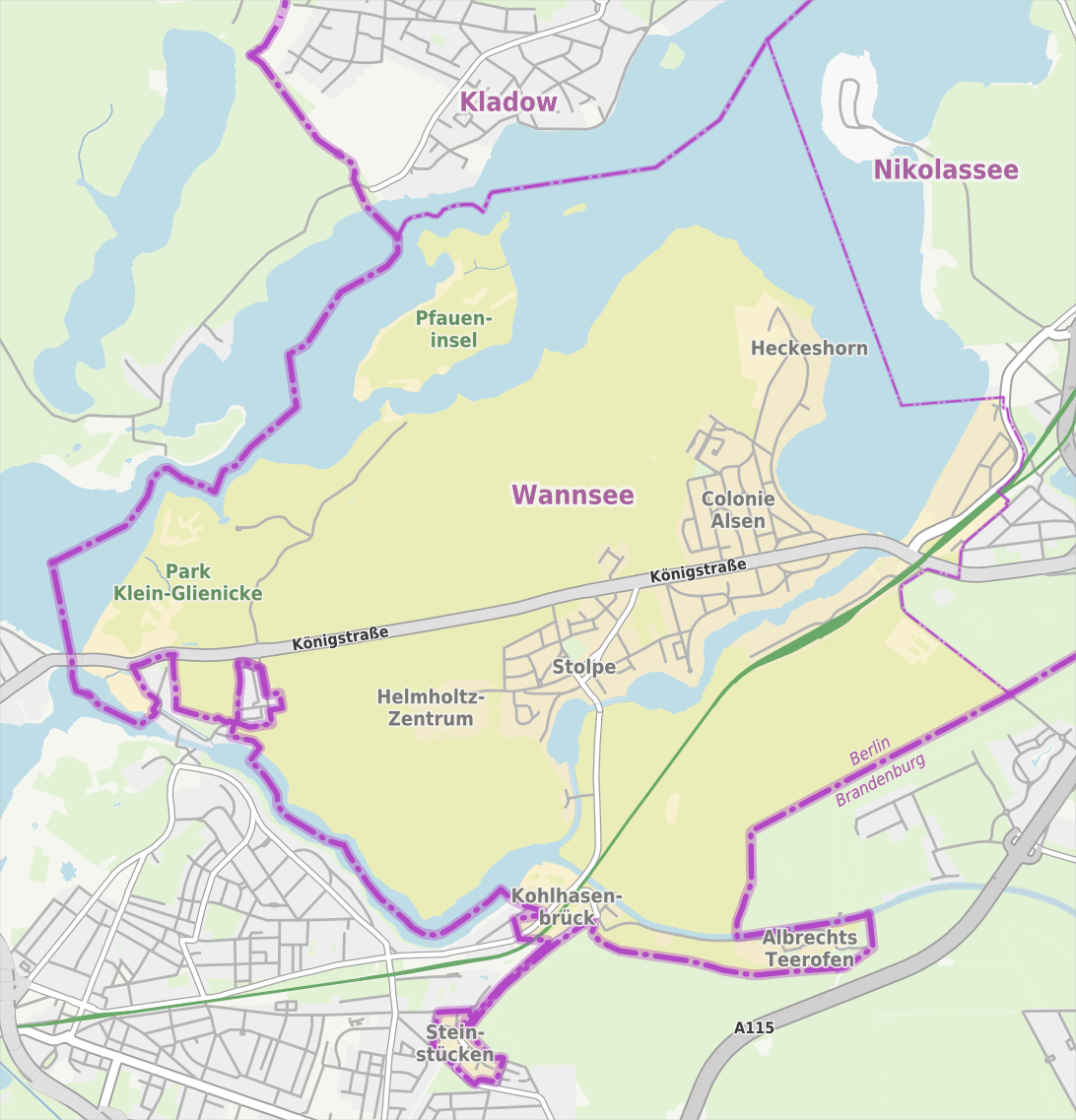 Übersichtskarte der Straßen und Ortslagen in Berlin-Wannsee